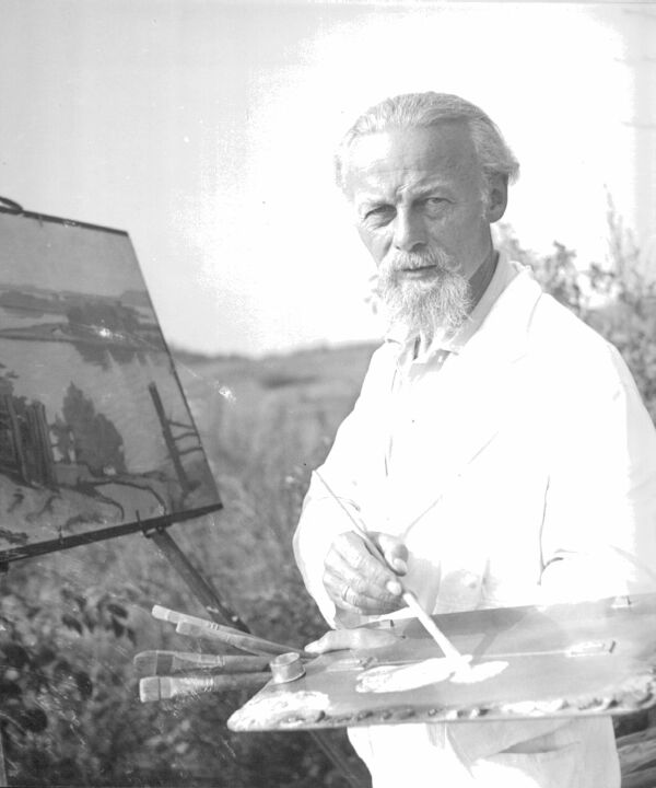 Thuro Balzer war ein deutscher Maler und Zeichner des frühen 20. Jahrhunderts. Das Bild ist ein Scan eines Fotos aus dem Familienalbum meiner Mutter: Johanna Völker, geb. Balzer. Friedels